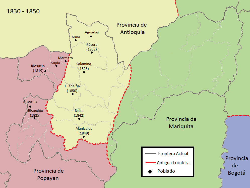 Caldas de 1830 a 1850